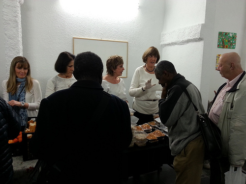 BarcelonActua, voluntariado Raval